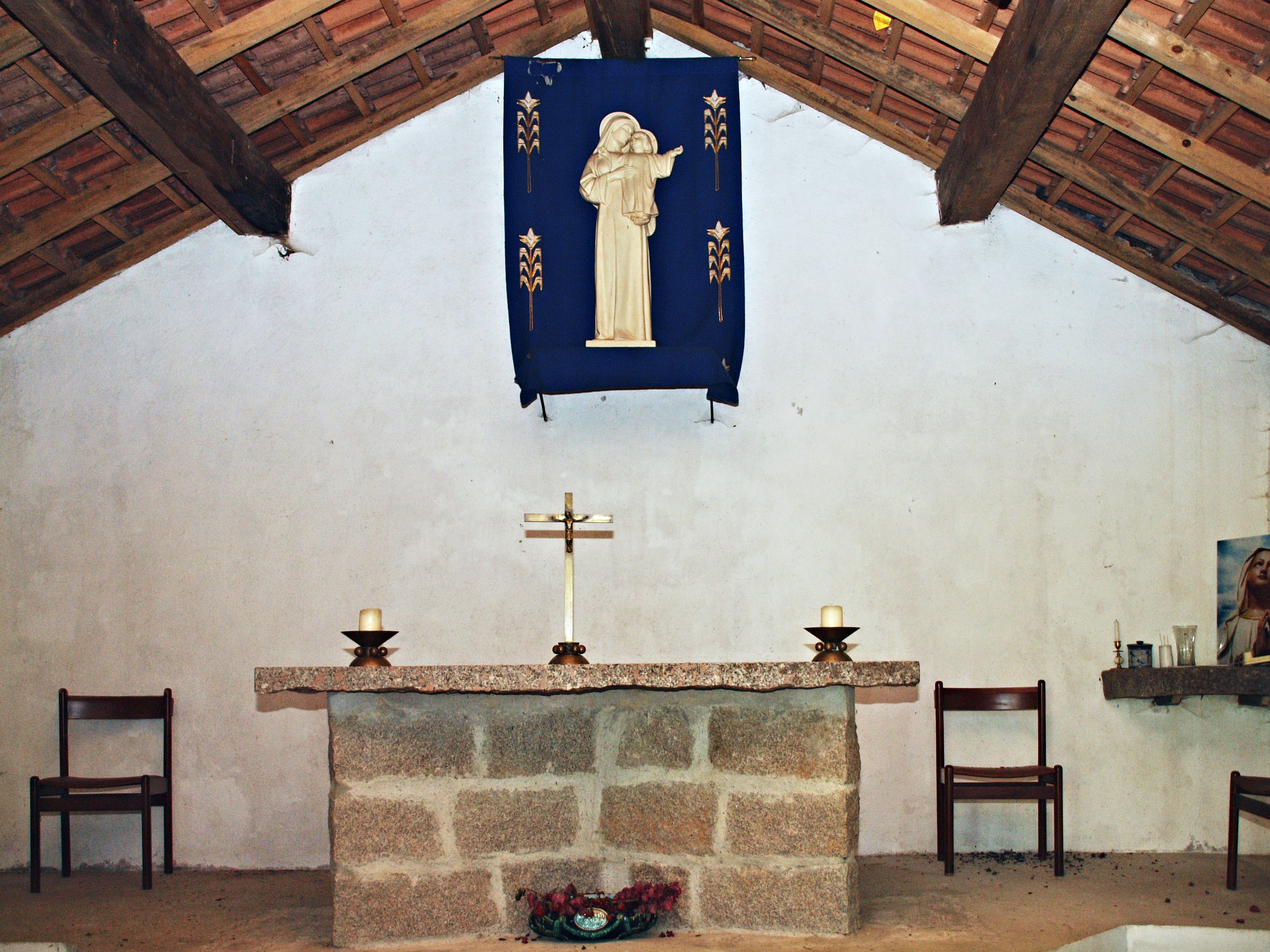 Vivario, Centre Corse (Corse) - Intérieur de la chapelle Notre Dame de la Forêt à Vizzavona